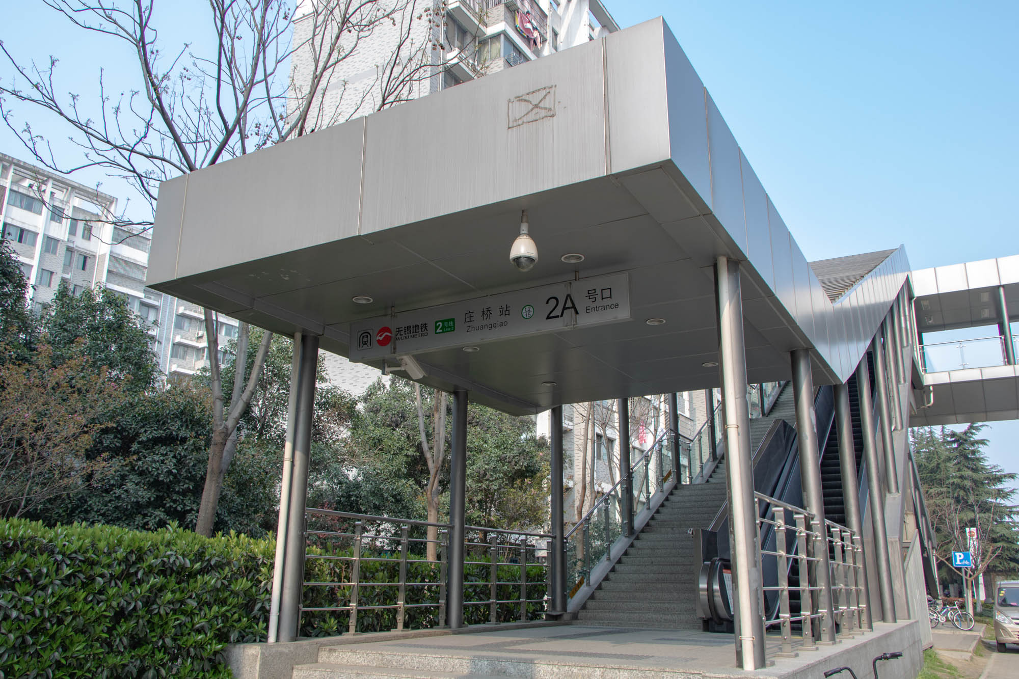 中文（中国大陆）: 庄桥站2A出入口